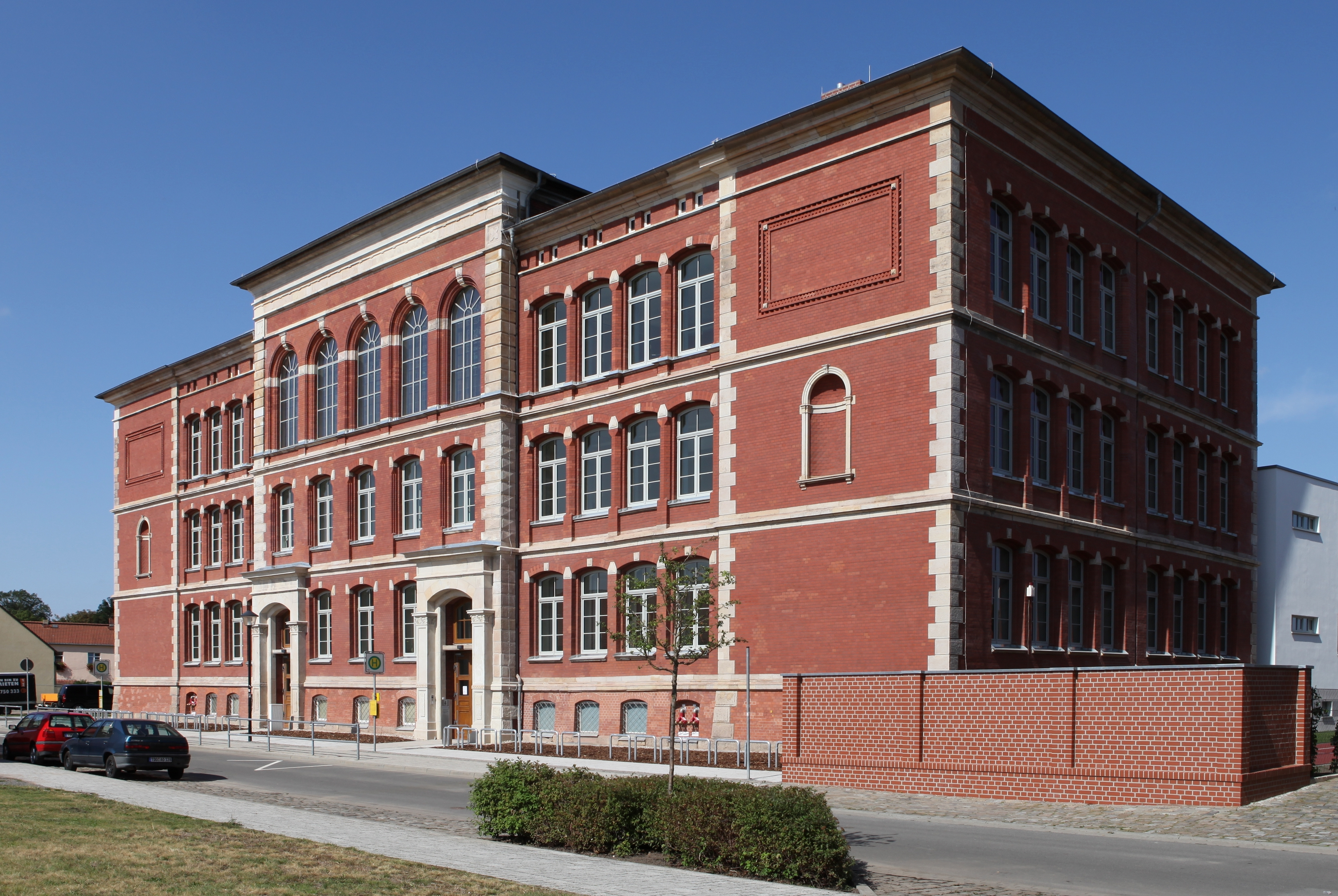 Kulturdenkmal Schule Dorotheenstraße 4 in Eilenburg; Objektnummer: 08973265